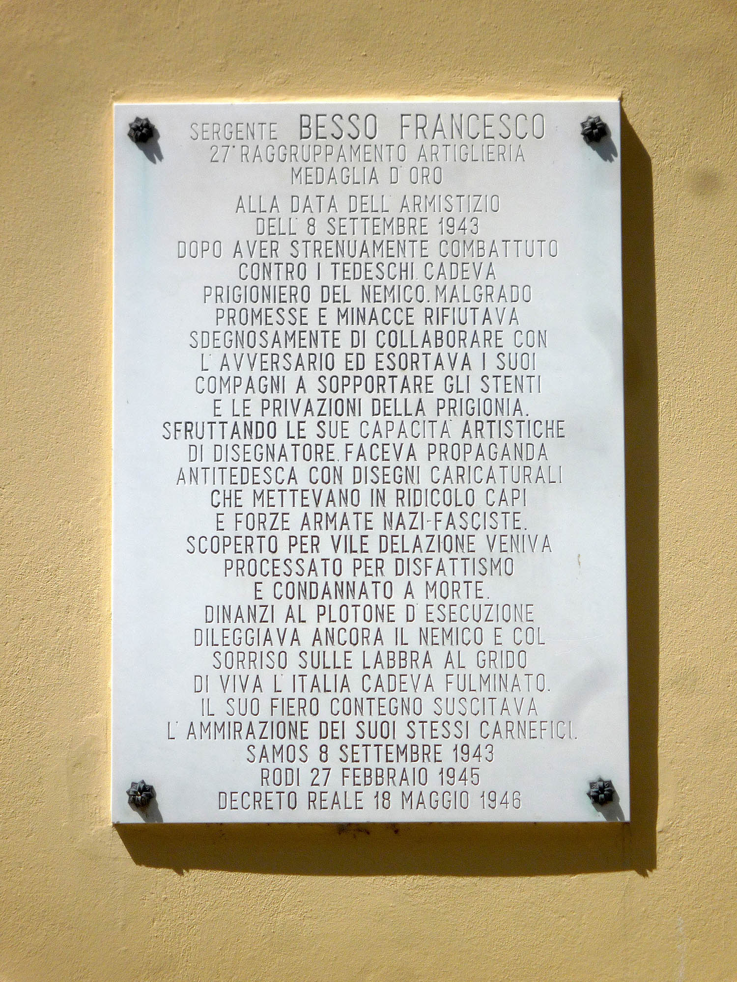 Vignale Monferrato (AL), lapide alla memoria dell'antifascista Francesco Besso.